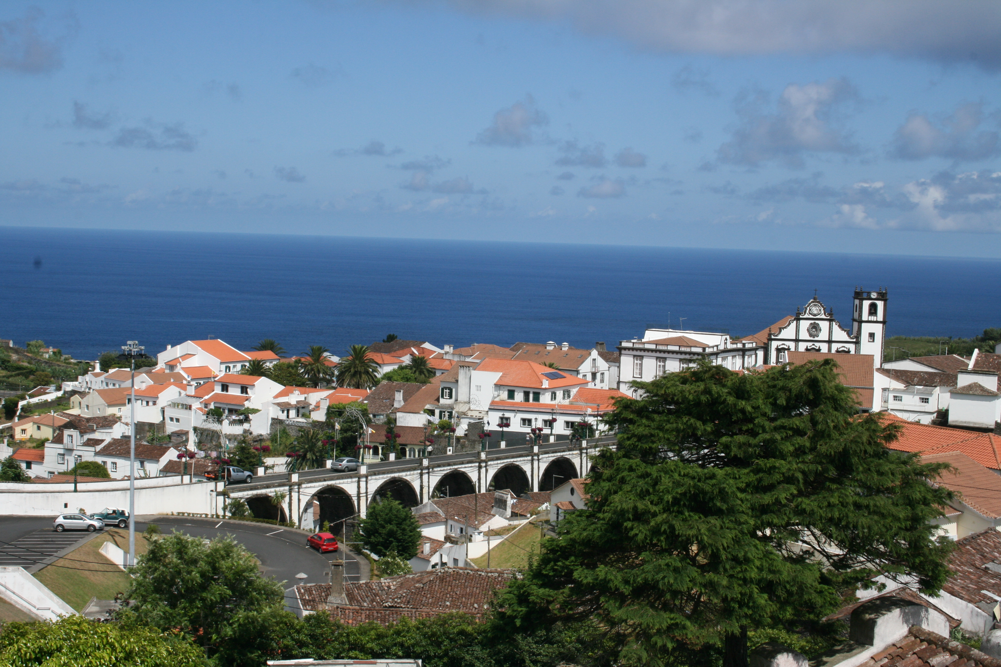 Azores - Noordeste